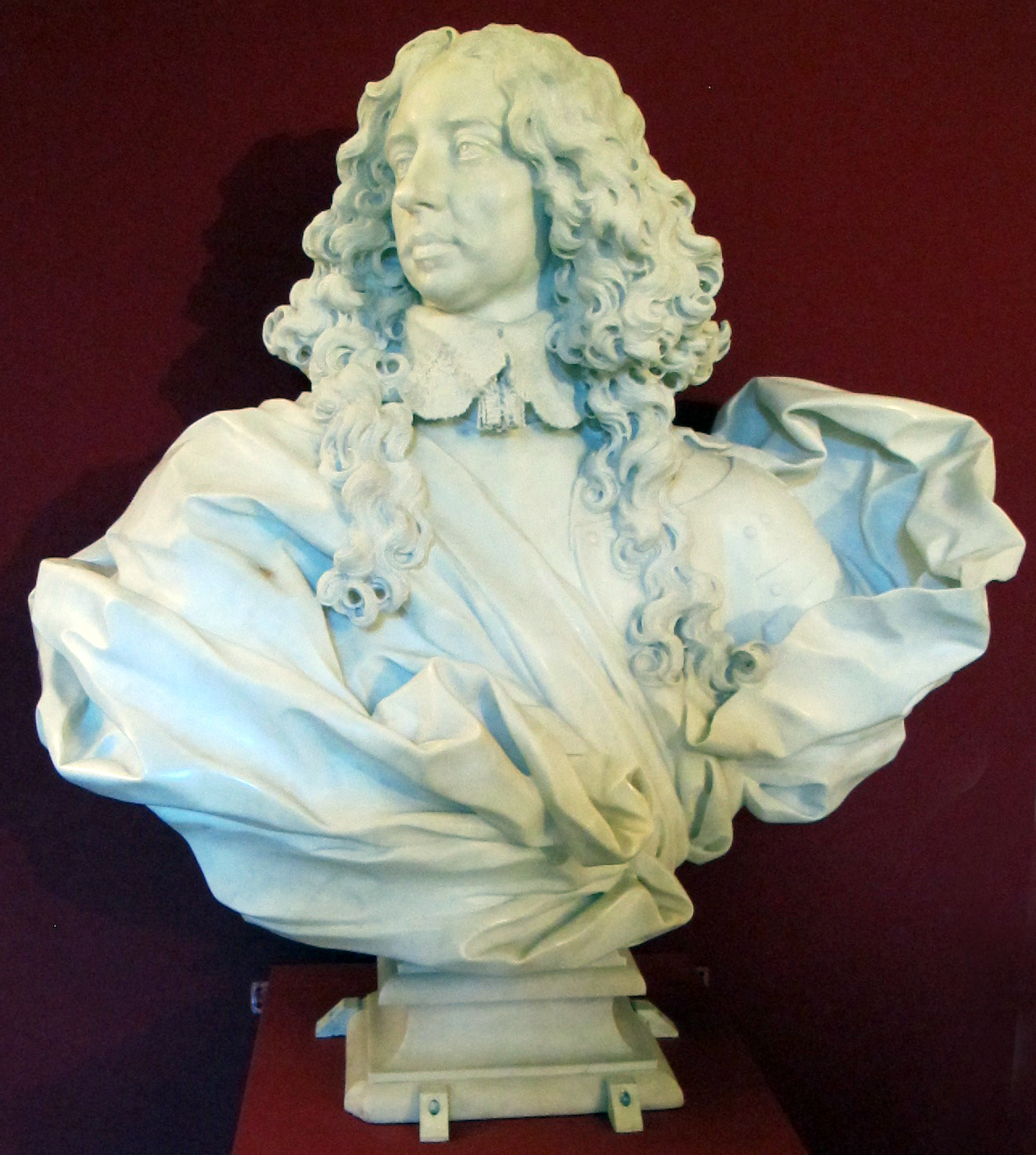 Gianlorenzo bernini, busto di francesco I d'este, 1650-51